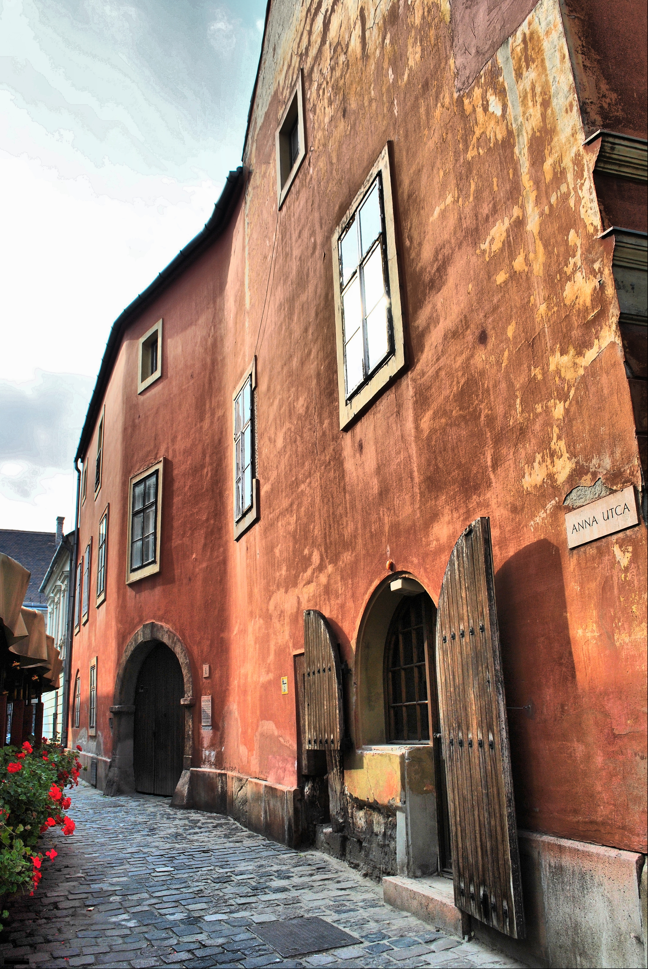 Egyemeletes lakóház (Budapest 1, Anna utca 1., Tárnok utca 18.) This is a photo of a monument in Hungary, Identifier: 72